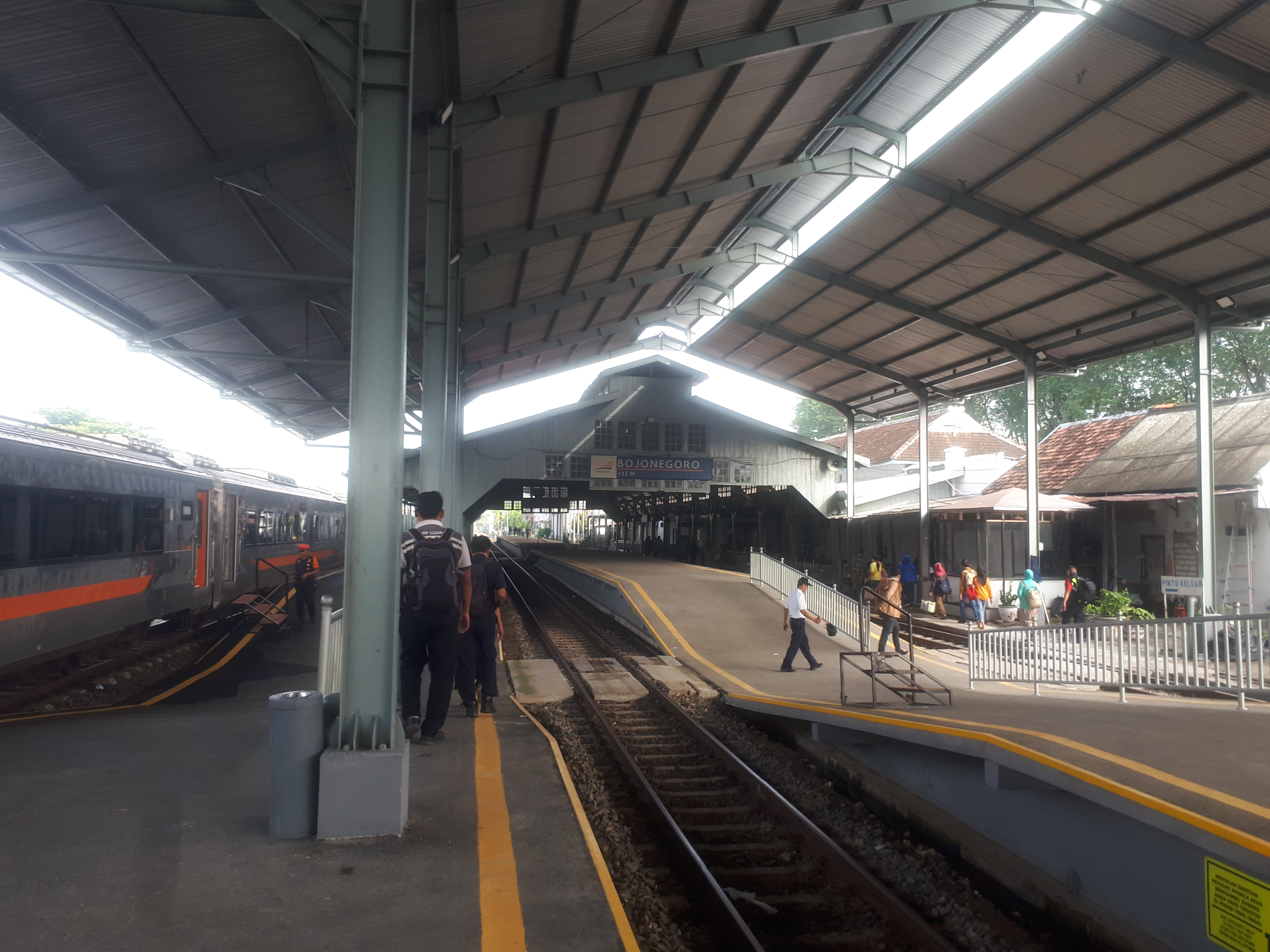 Peron Stasiun Bojonegoro tahun 2020